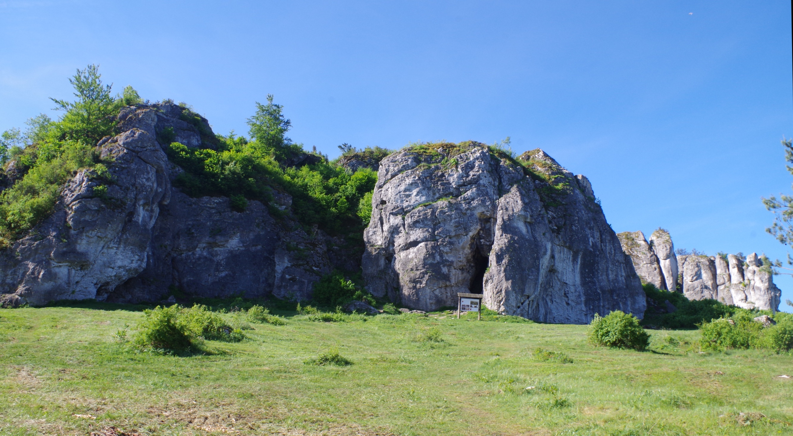 Mirowskie Skały